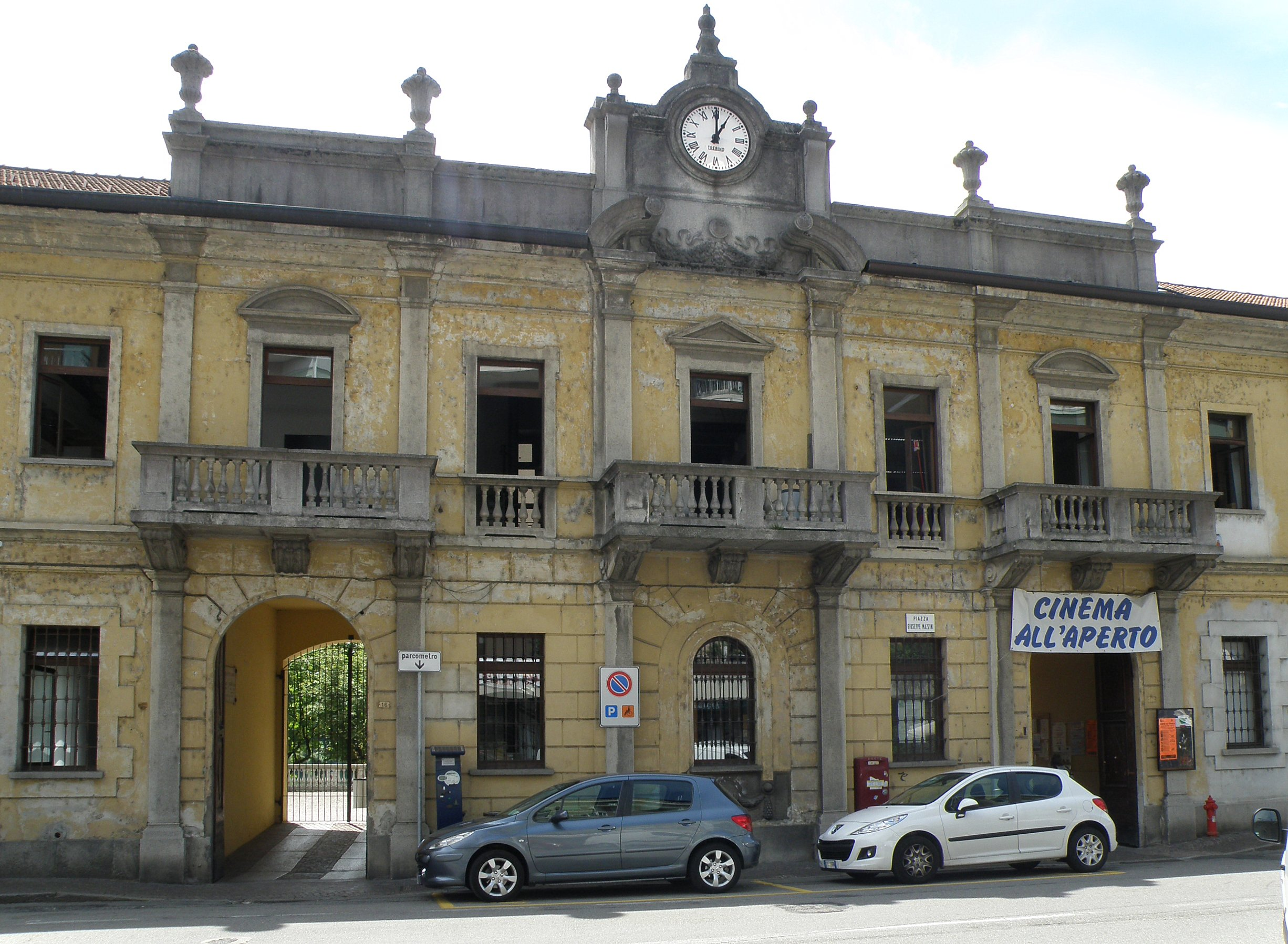 Sesto Calende, ville italienne de la prov. de Varèse, sur le Tessin. Mairie (municipio), façade principale.